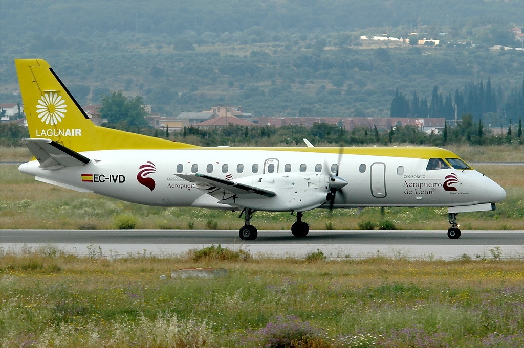 Saab 340A Malaga (AGP / LEMG) Spain, May 2004 EC-IVD (cn 340A-117) Taxiing to runway 14 for departure